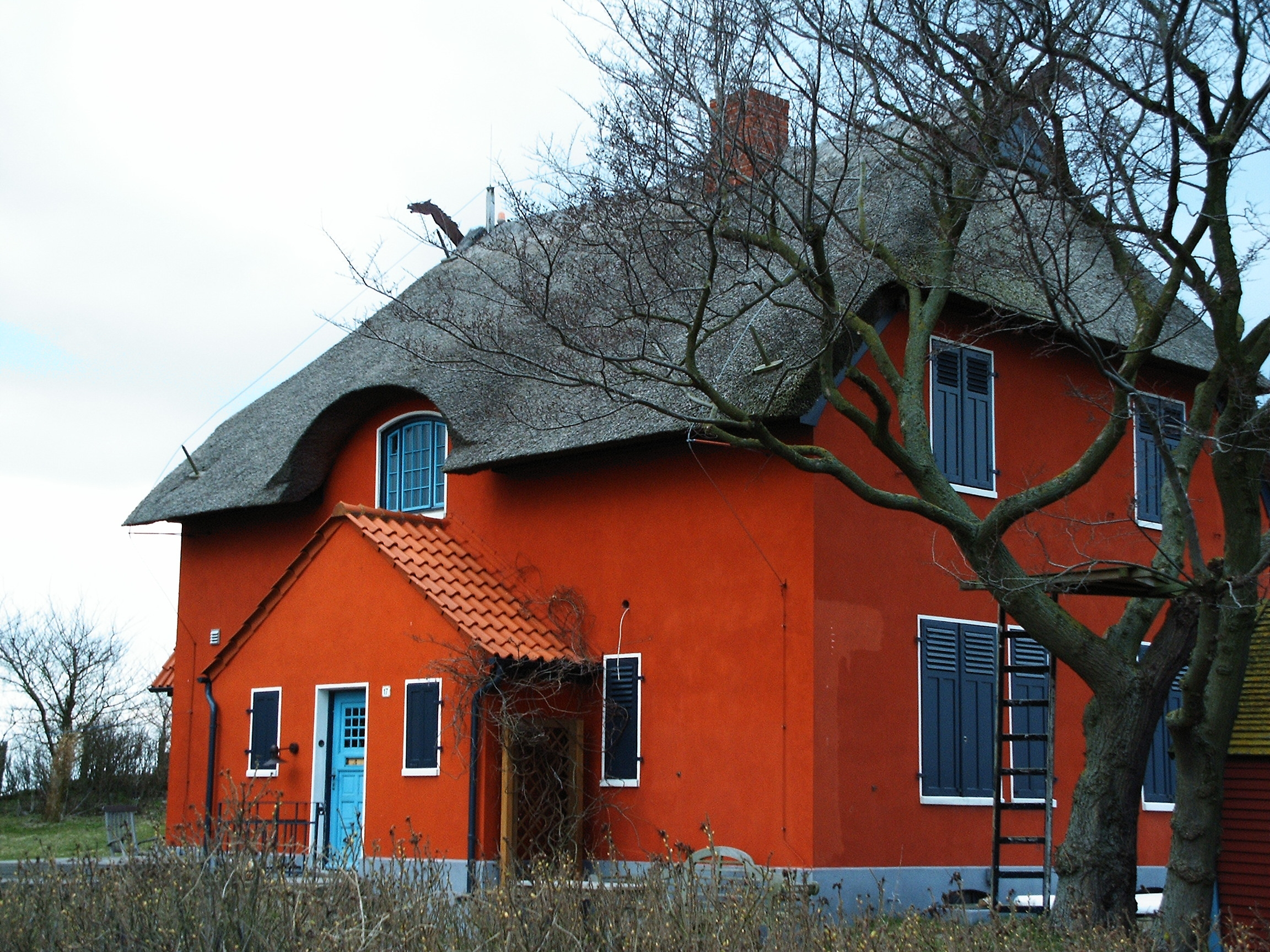 Denkmalgeschütztes Haus am Graswarder, Graswarder(weg) 17, Heiligenhafen